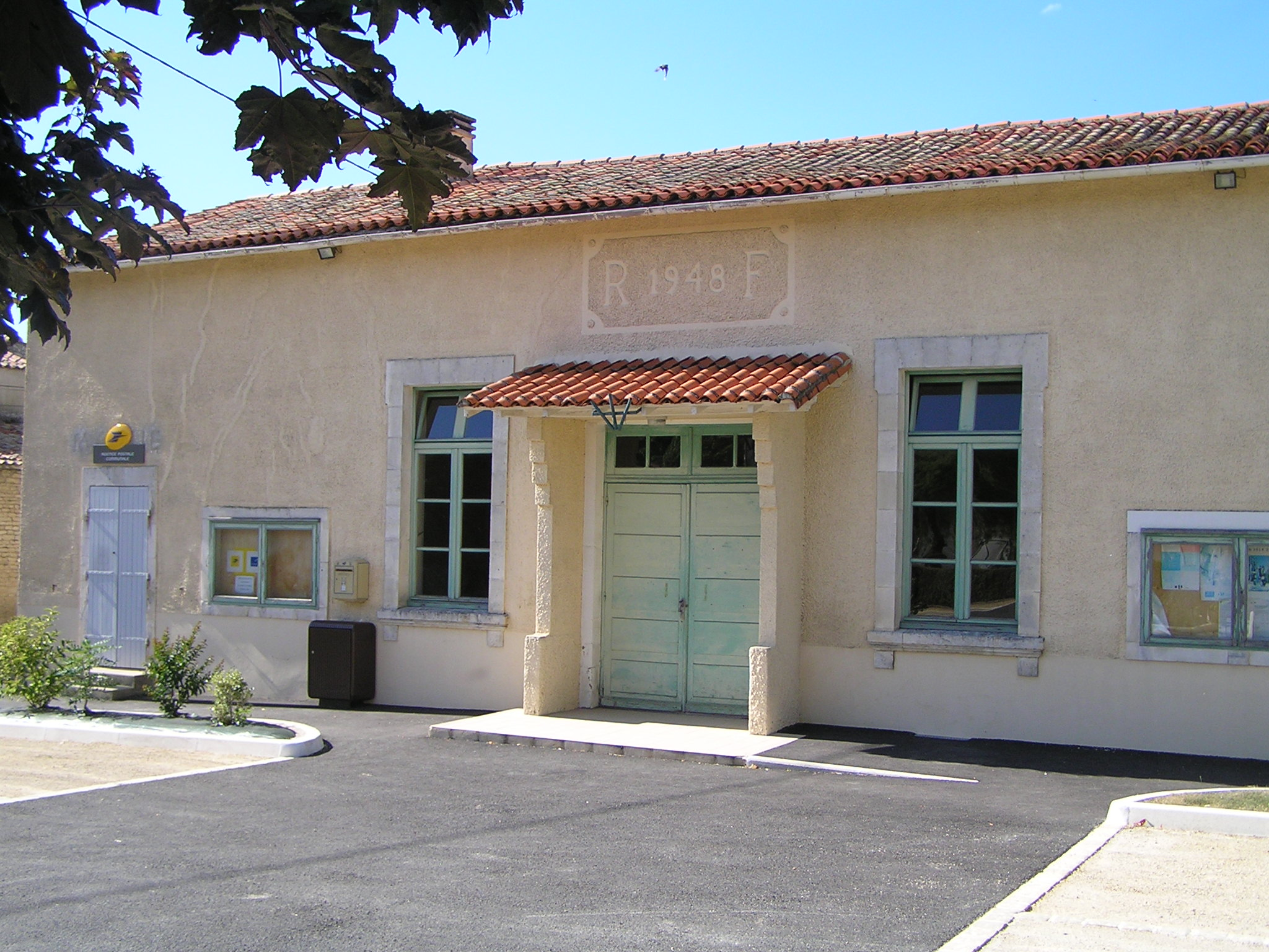 mairie de Longré